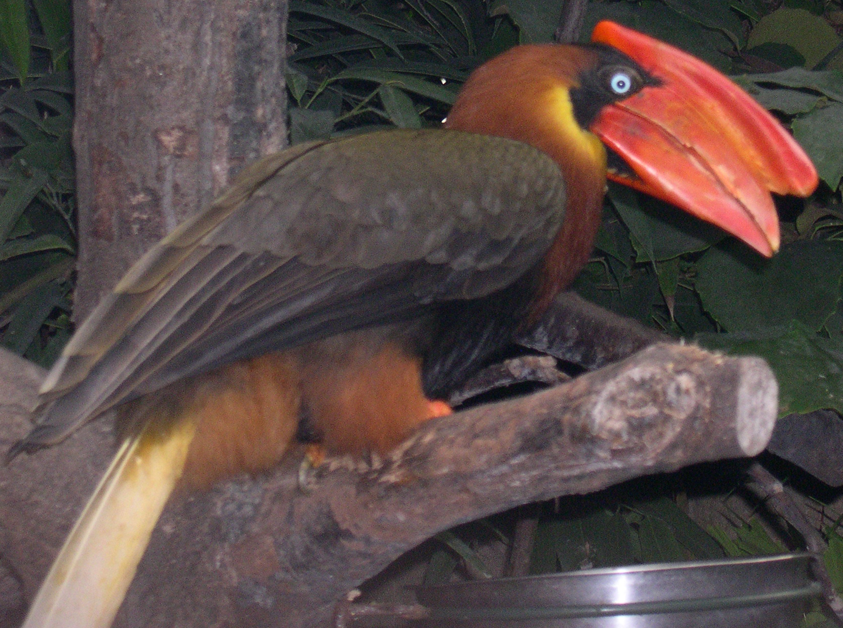 Een Rosse neushoornvogel (Buceros hydrocorax) in de Filipijnenhal van Avifauna in 2005